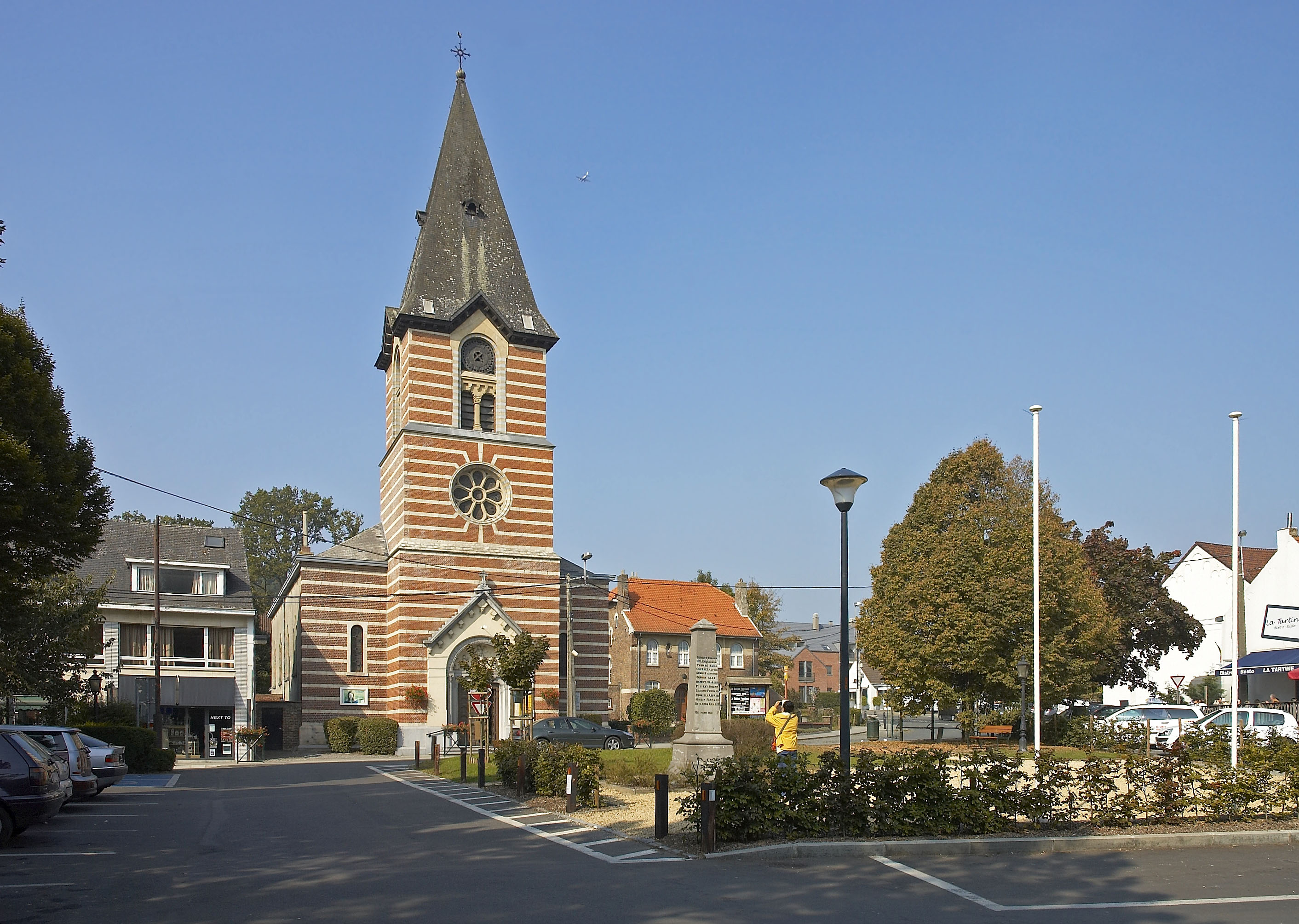 Sainte Gertrude kerk in Lasne